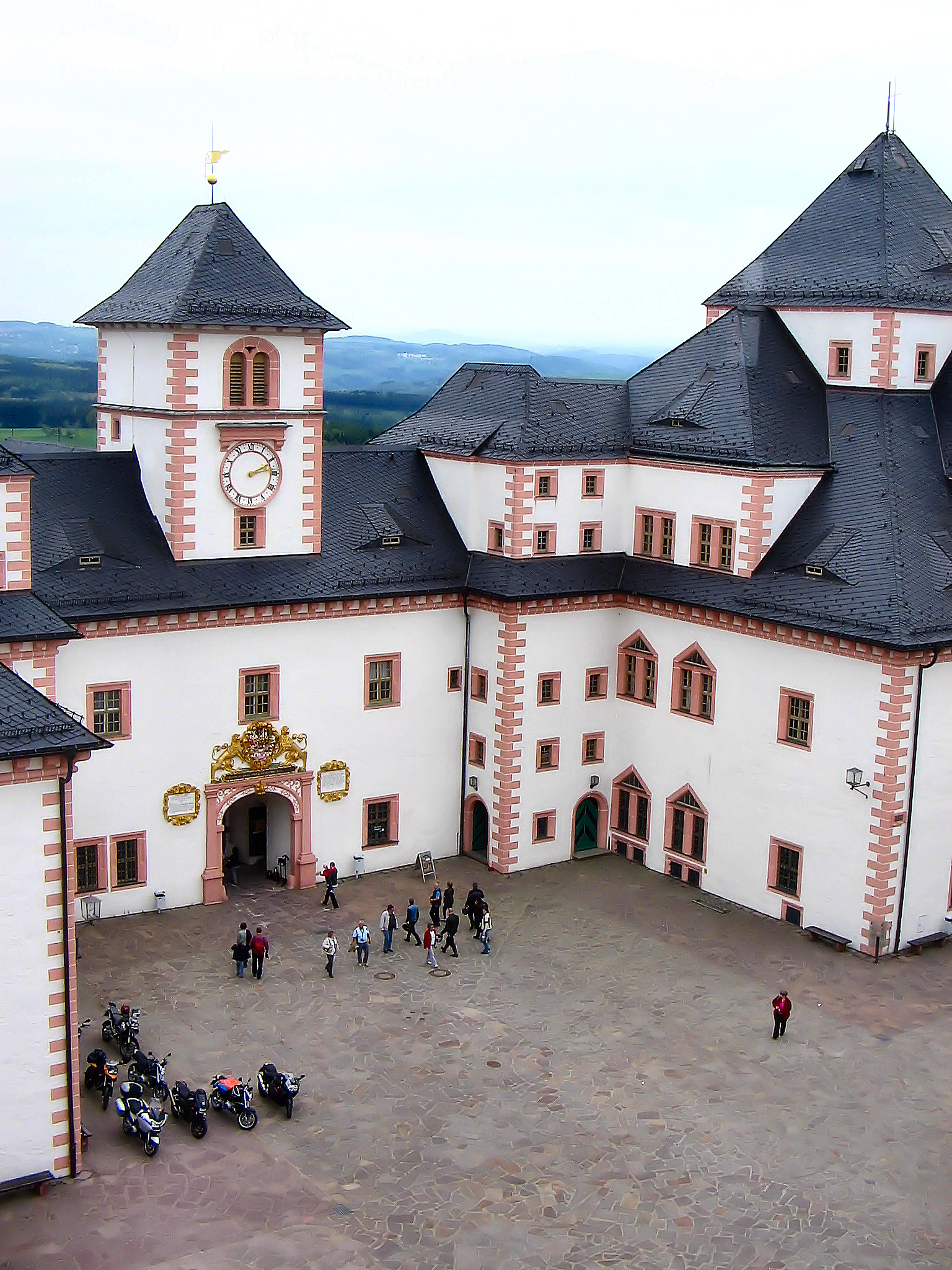 Blick in den Schlosshof der Augustusburg